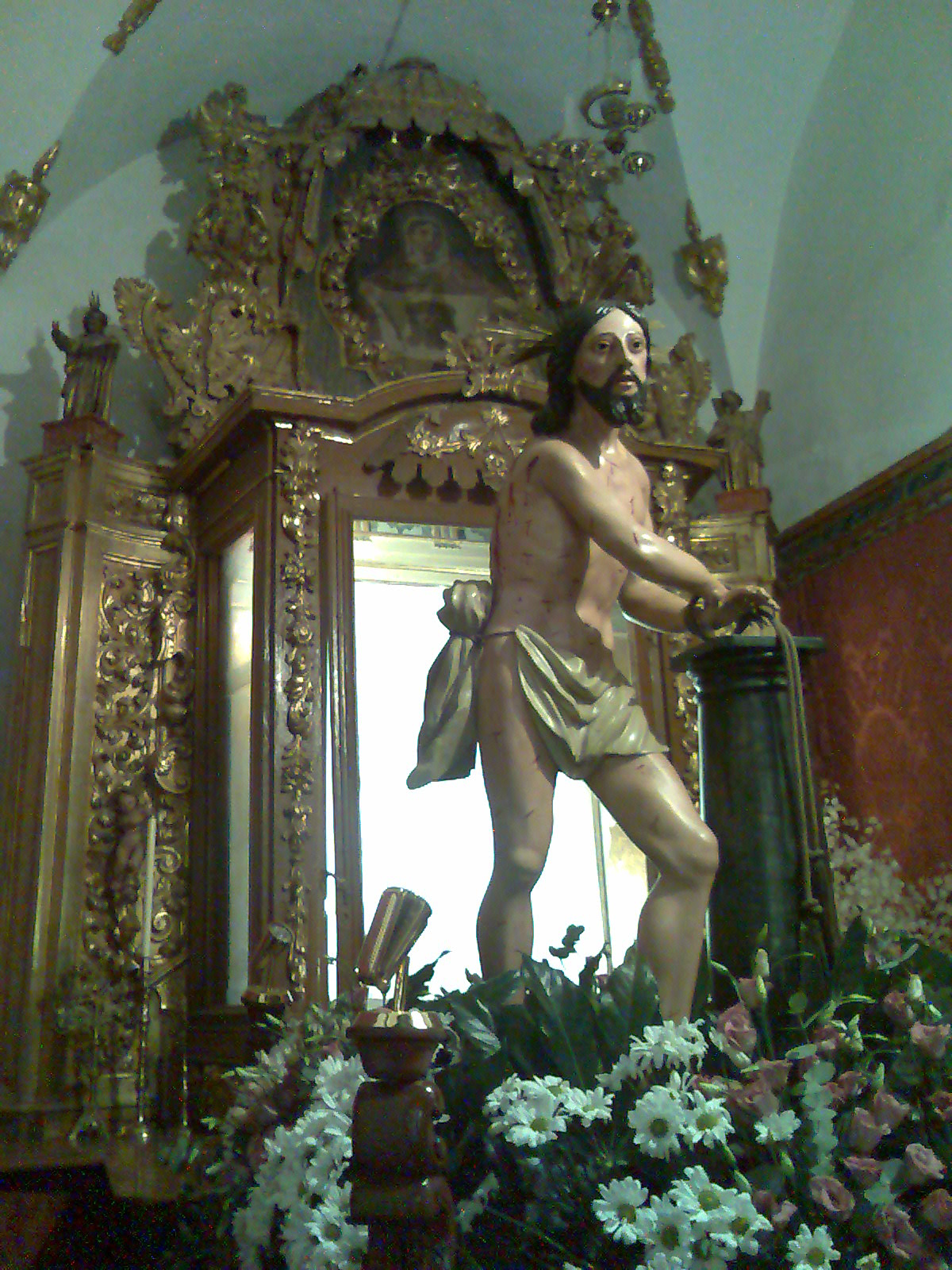 Cristo en el momento de los latigazos